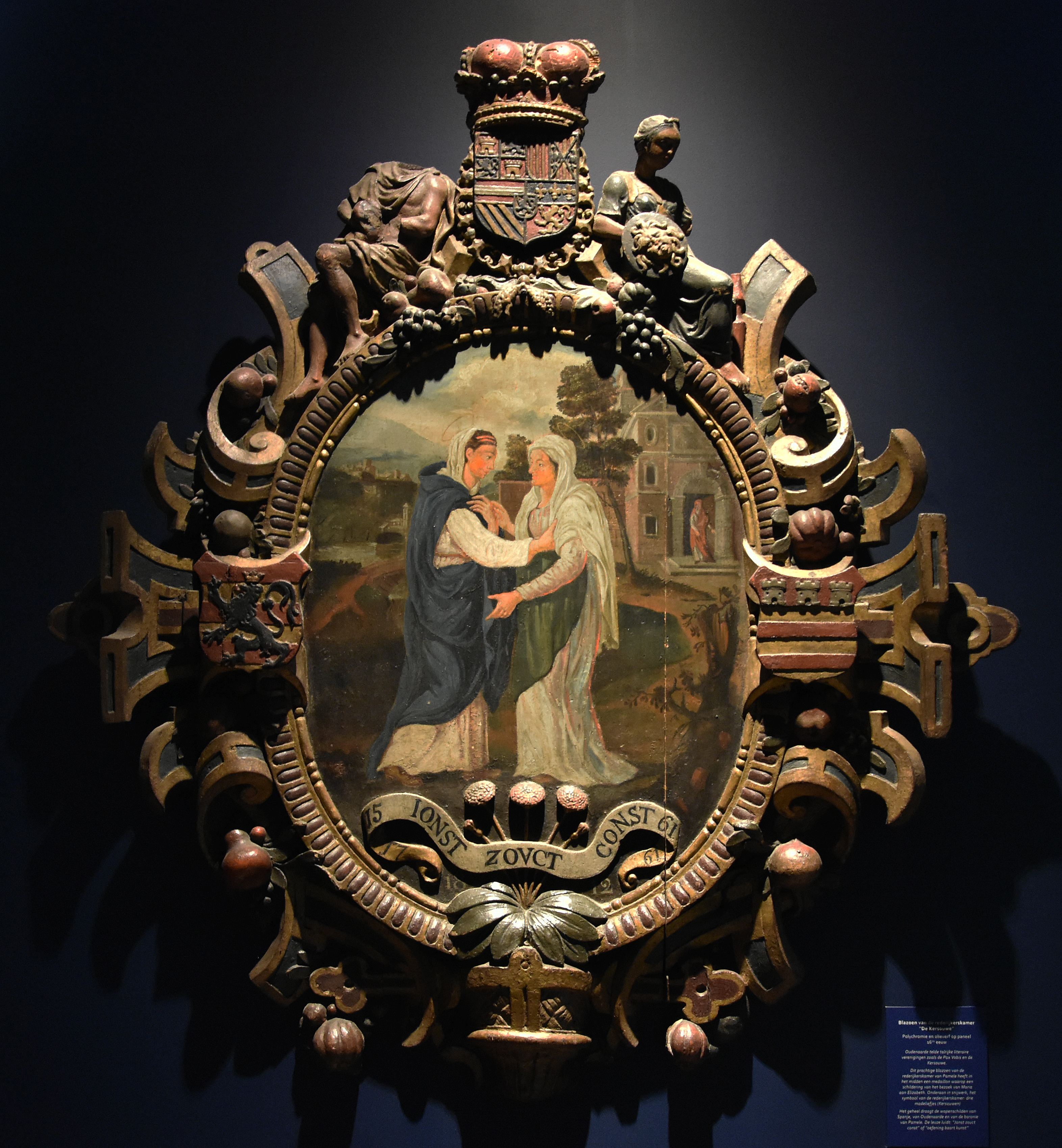 Blazoen van Rederijkerskamer De Kersouwe - 16e-eeuws - MOU Museum Oudenaarde met de leuze 'Jonst zoect const' of 'oefening baart kunst' met de wapenschilden van Spanje, Oudenaarde en de baronie van Pamel. In het midden Maria bezoekt Elisabeth - onderaan drie madeliefjes (kersouwen)